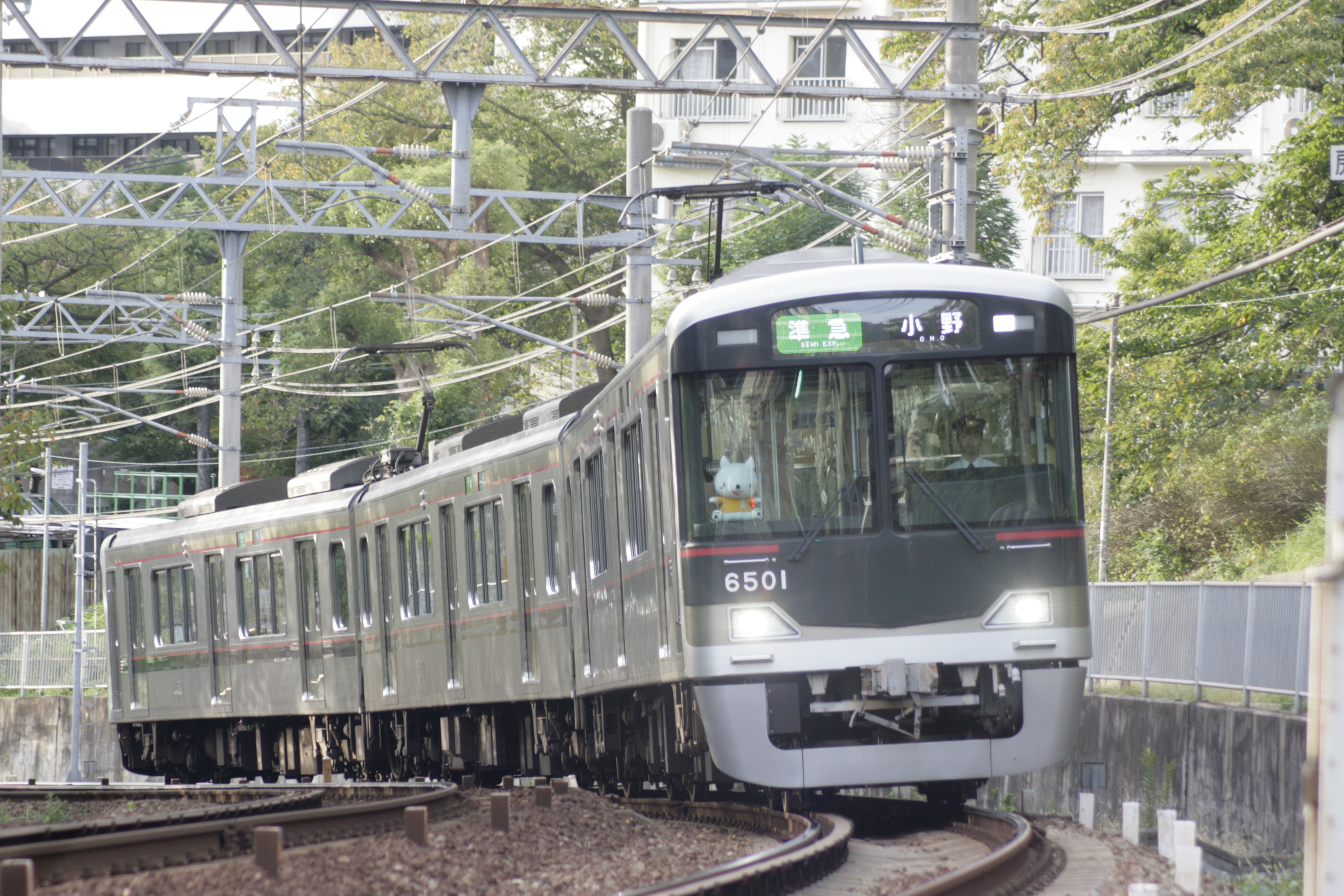 2019年10月20日 湊川～長田間にて撮影。